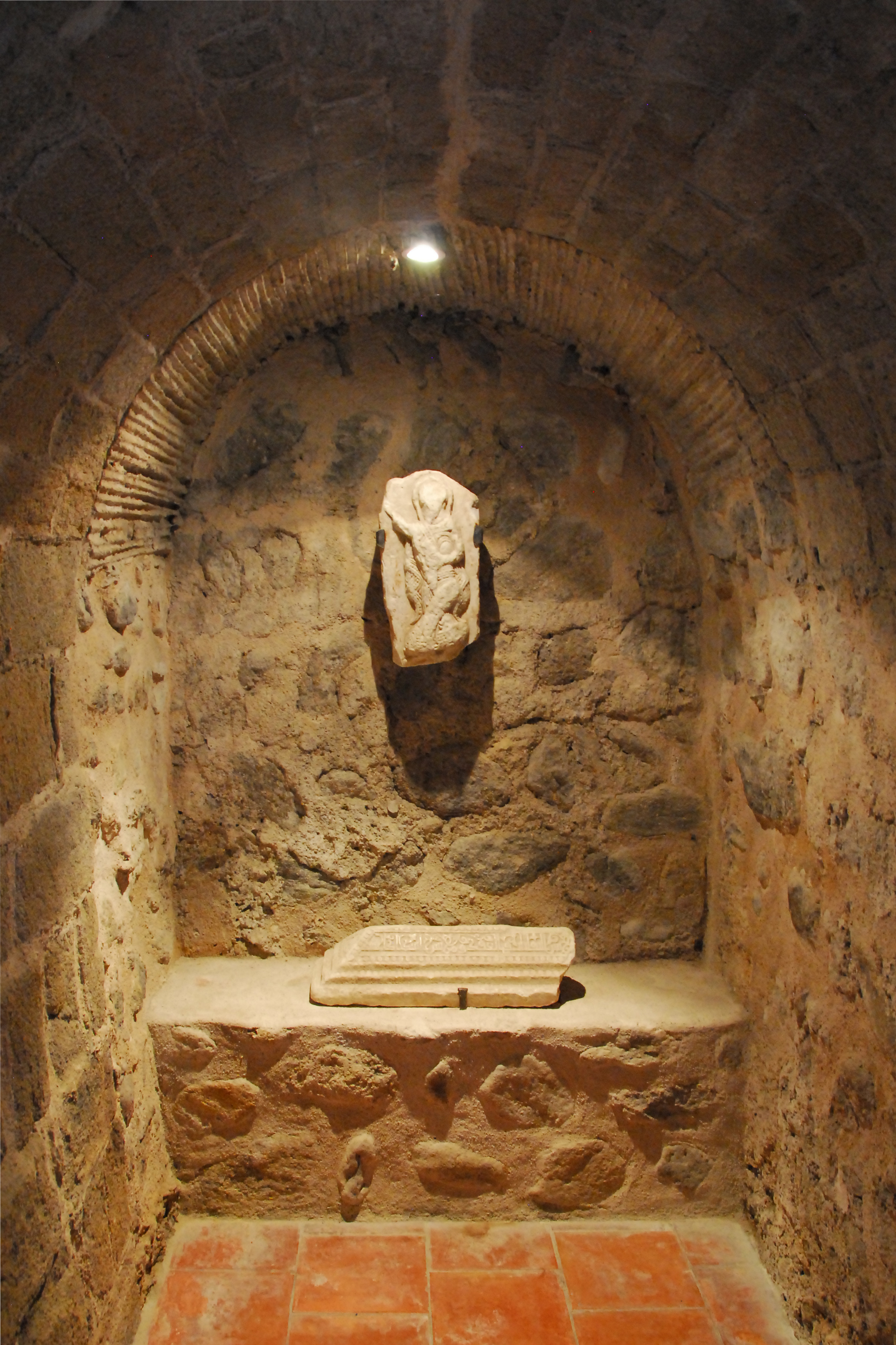 St-André-de-Sorède, Fragment eines muslemischen Grabsteins